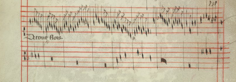 Intabulation De tout flors de G. de Machaut — Codex Faenza, folio 37v.